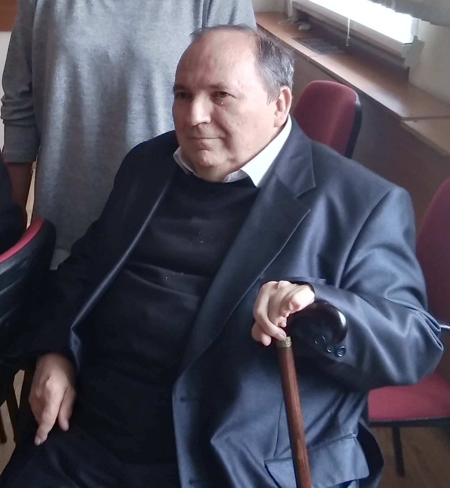 Николай Николаевич Лисовой на конференции в ИРИ РАН посвященной 90-летию Я.Н.Щапова, май 2018 года